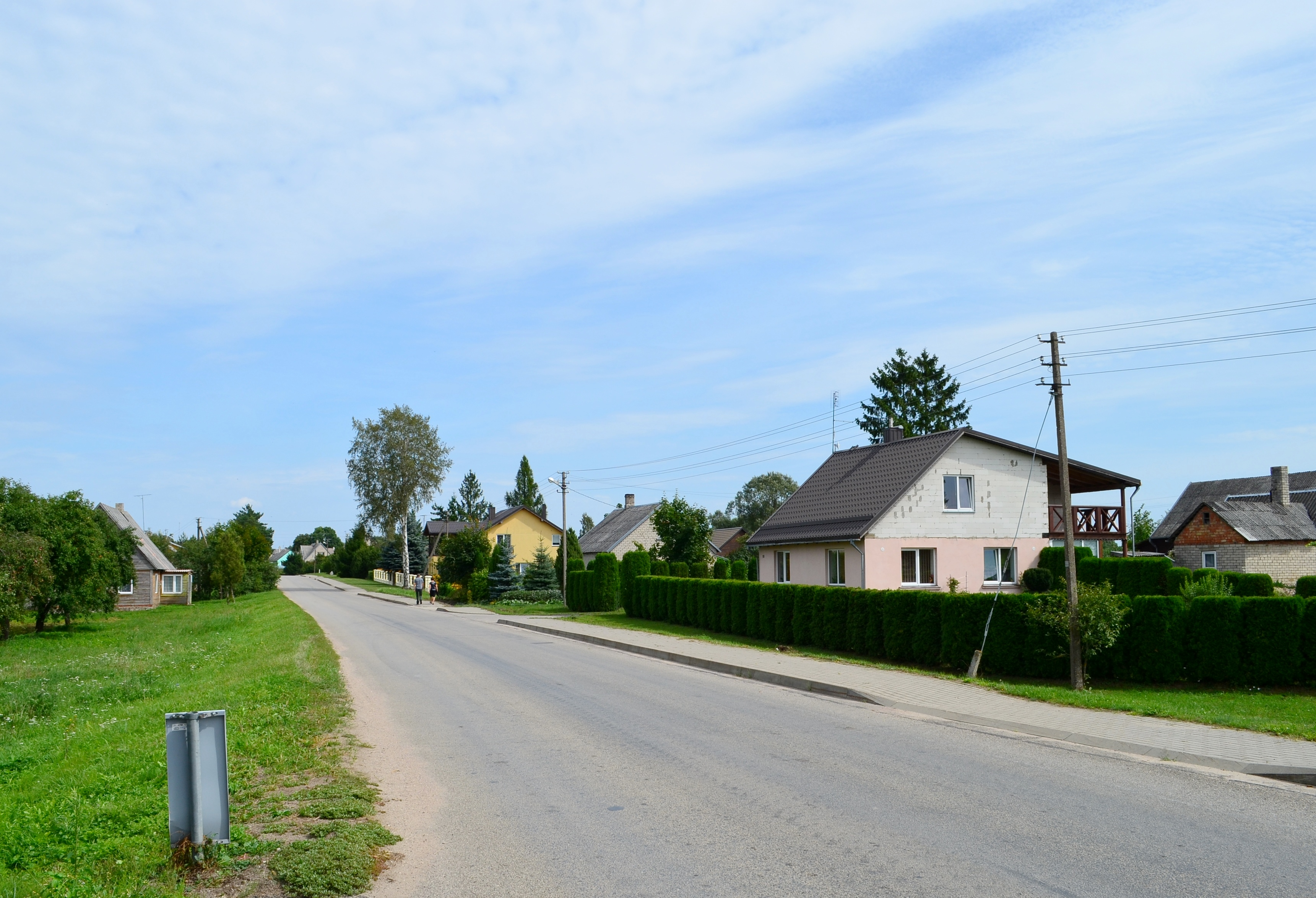 Bartninkai, Vilkaviškio raj.